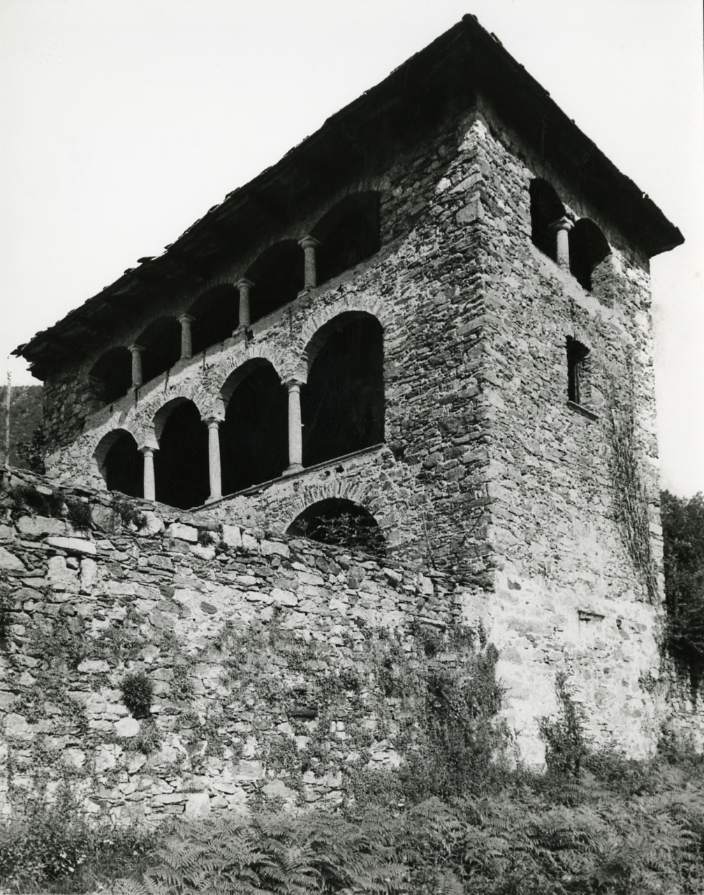 Servizio fotografico : Nonio, 1980 / Paolo Monti. - Stampe: 4 : Positivo b/n, gelatina bromuro d'argento/ carta, 24x30. - ((Al verso delle stampe manoscritti i numeri dei negativi (e dei fogli di provini dei negativi) corrispondenti secondo altra numerazione (riportata anche nei fogli dattiloscritti conservati nella scatola "Lago d'Orta", numerata 44): A49/11 (lo stesso numero identifica 2 stampe - 2 copie), 48/35, 49/22; iscrizioni didascaliche manoscritte a matita: "Nonio", "Brolo"; timbro a inchiostro con copyright: "© Copyright/ Credit to/ Paolo Monti/ Corso Sempione [...]/ Milano". - Sul coperchio della scatola iscrizione didascalica manoscritta a pennarello nero: "Lago d'Orta". - All'interno della scatola fogli pinzati dattiloscritti con indicazioni di luogo e data di ripresa del lavoro sul Lago d'Orta. - Occasione: Documentazione per la pubblicazione: Alberti Luigi, Rainaldi Giancesare, Rizzi Enrico (a cura di), "Elogio del Lago d'Orta", Anzola d'Ossola-Valstrona, Fondazione arch. Enrico Monti-Lo Strona, 1983. - Fonte: Fattura di Paolo Monti: IV. Commesse/ Fattura n. 06/ Riprese fotografiche città di Orta e Lago d'Orta (1982/04/10), presso Archivio Paolo Monti. N. 450 fotografie formato 24x30. - Fonte: Monografia di Alberti Luigi, Rainaldi Giancesare, Rizzi Enrico: Elogio del Lago d'Orta, Anzola d'Ossola-Valstrona, Fondazione arch. Enrico Monti-Lo Strona (1983). Alberti Luigi, Rainaldi Giancesare, Rizzi Enrico (a cura di)